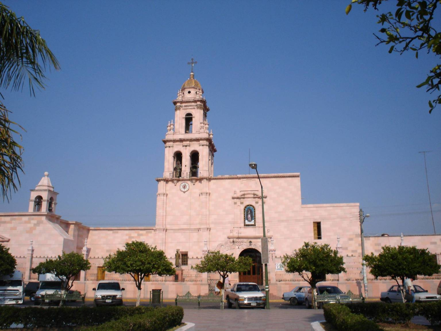 Parroquia donde se encuentra la imagen de San Miguel Arcangel.